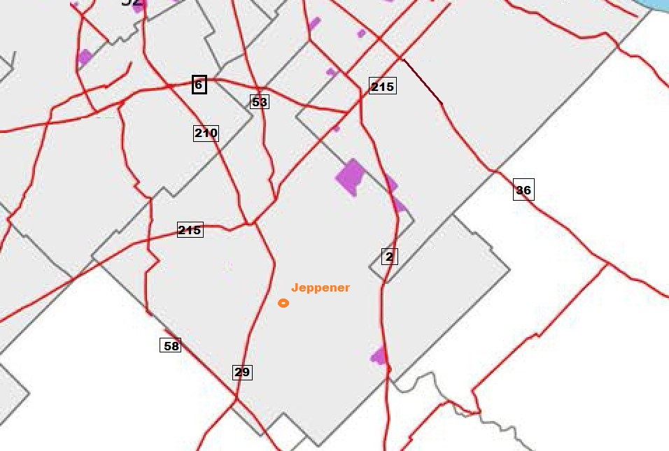 jeppener